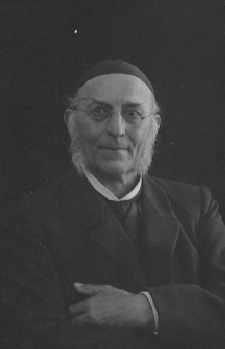 Lehrer der evangelischen Schule Bad Ischl von 15.8.1867 bis Ostern 1895. Unter seiner Führung geschah der wesentliche Ausbau der Gemeinde, Erweiterung und Einrichtung des Schul- und Kirchengebäudes.